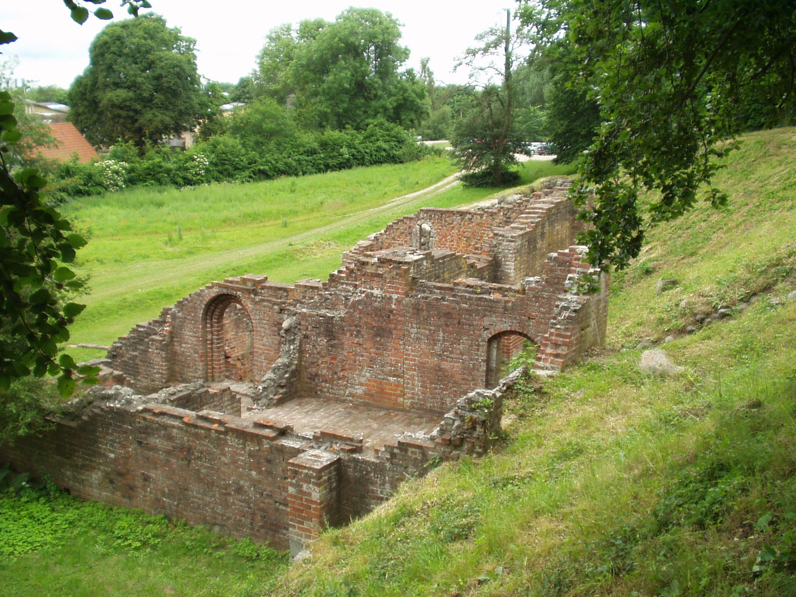 Ruiner etter Antvorskov kloster i Slagelse på Sjælland hvor biskop Mogens fra Hamar satt i fangenskap fra 1537 til han døde i 1542. Foto Egil Enemo